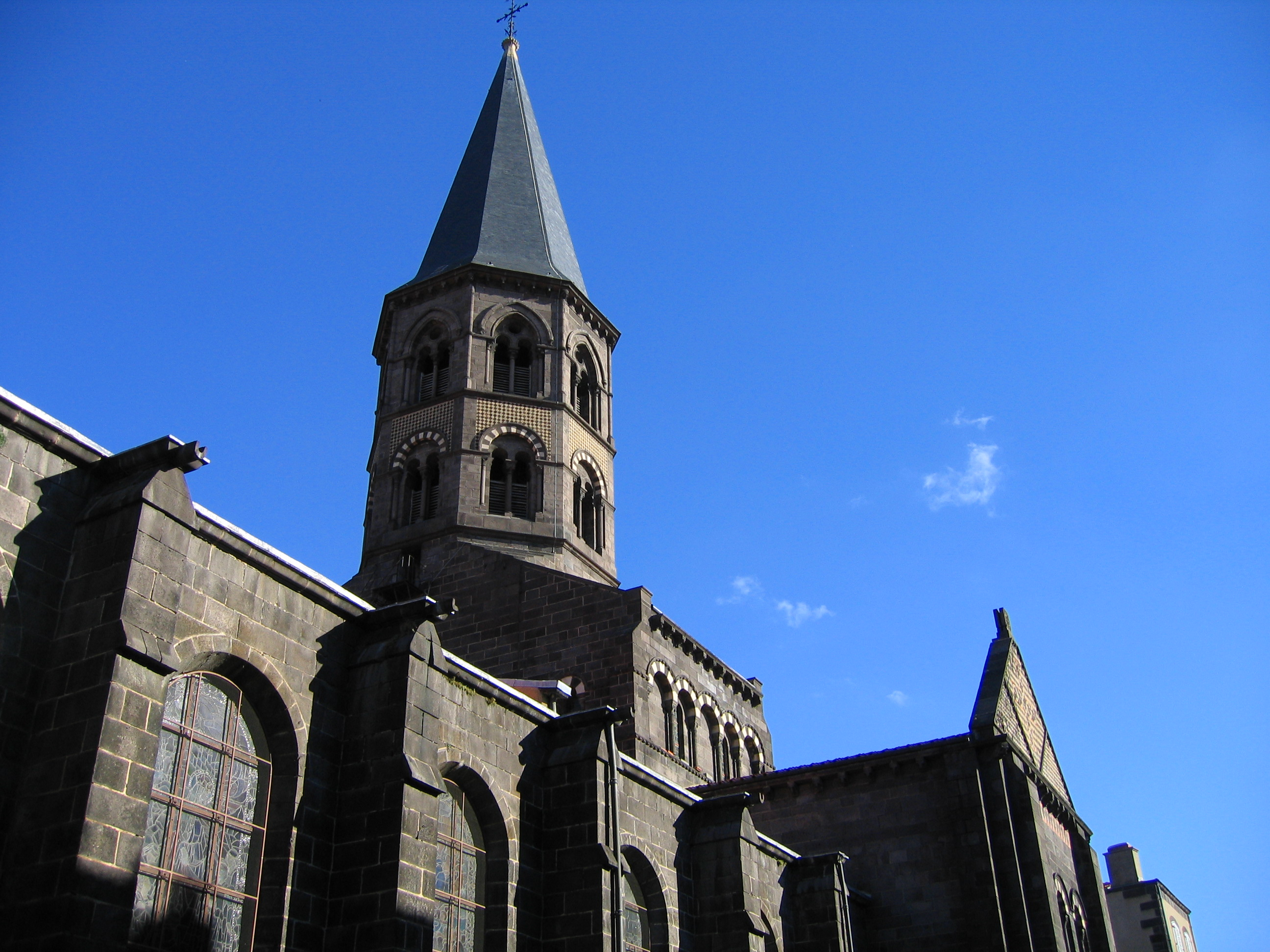 La basilique Saint-Amable | Commune : Riom | Département : Puy-de-Dôme | Région : Auvergne | Pays : France.